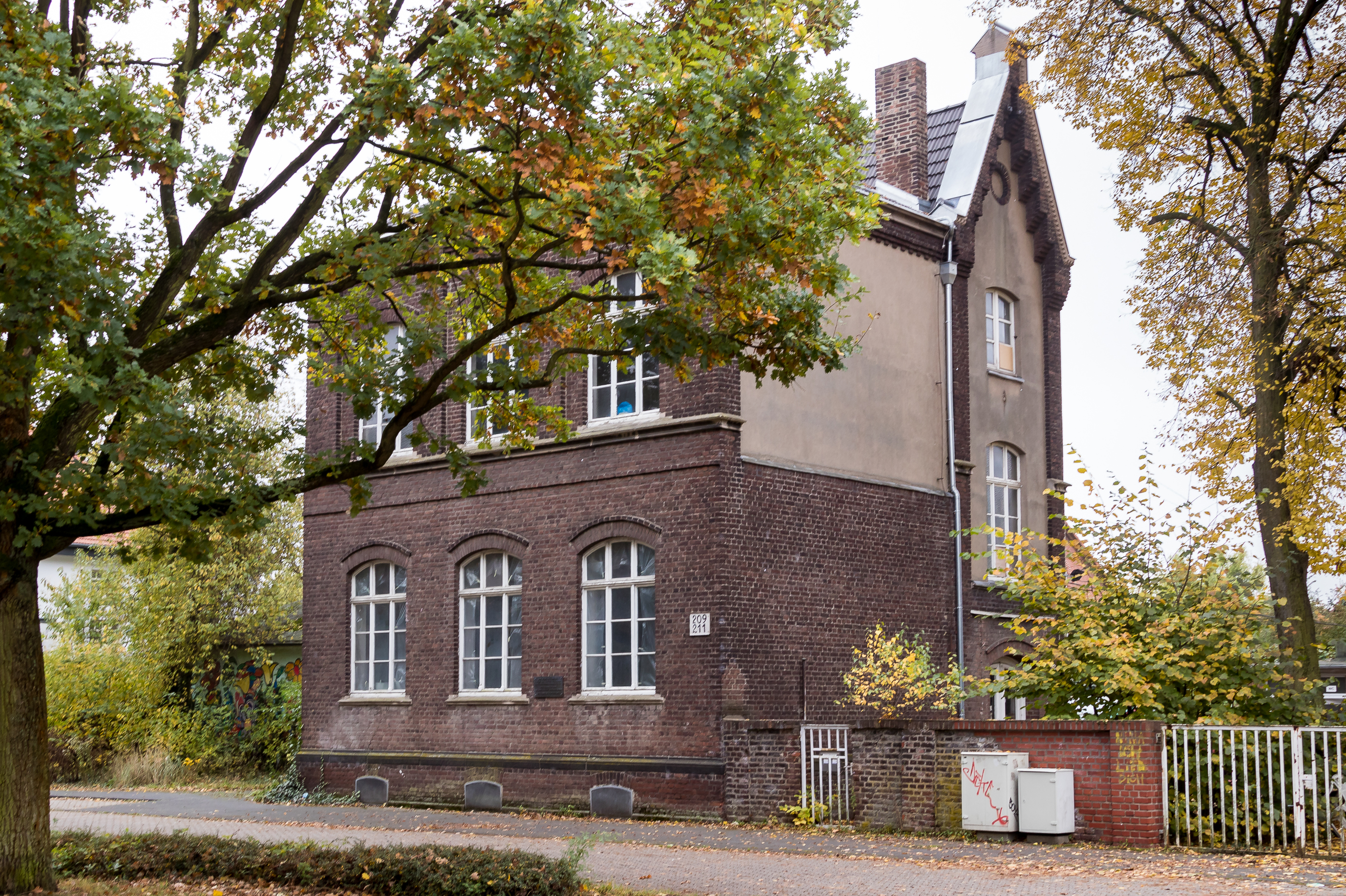 ehem. Volksschule Volkhoven, Volkhovener Weg 209–211